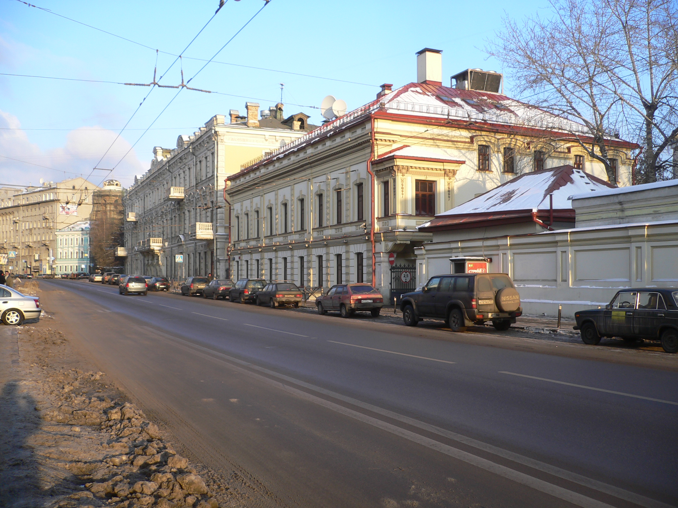 улица солянка, Москва